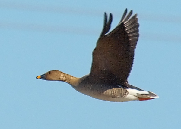 Anser serrirostris rossicus, Falkenberg, Halland, Sweden